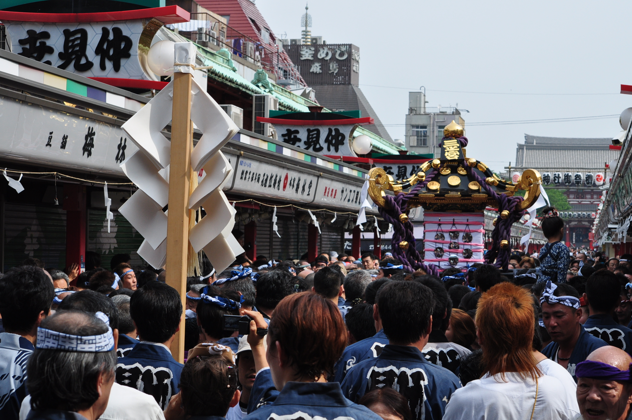 三之宮神輿宮出し